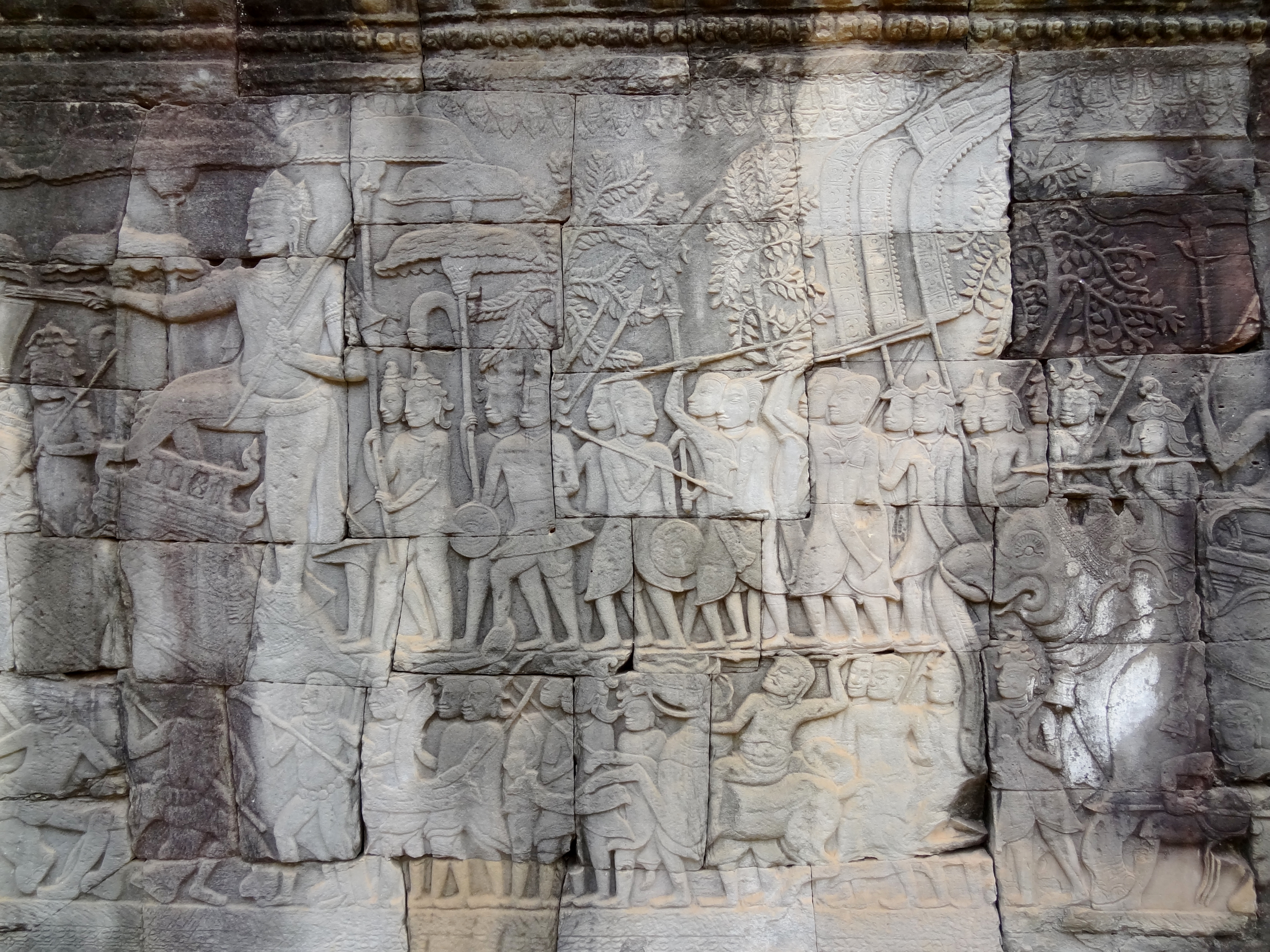 Relief des Bayon (ប្រាសាទបាយ័ន) von Angkor Thom (អង្គរធំ ‚Große Hauptstadt‘), Provinz Siem Reap, Kambodscha